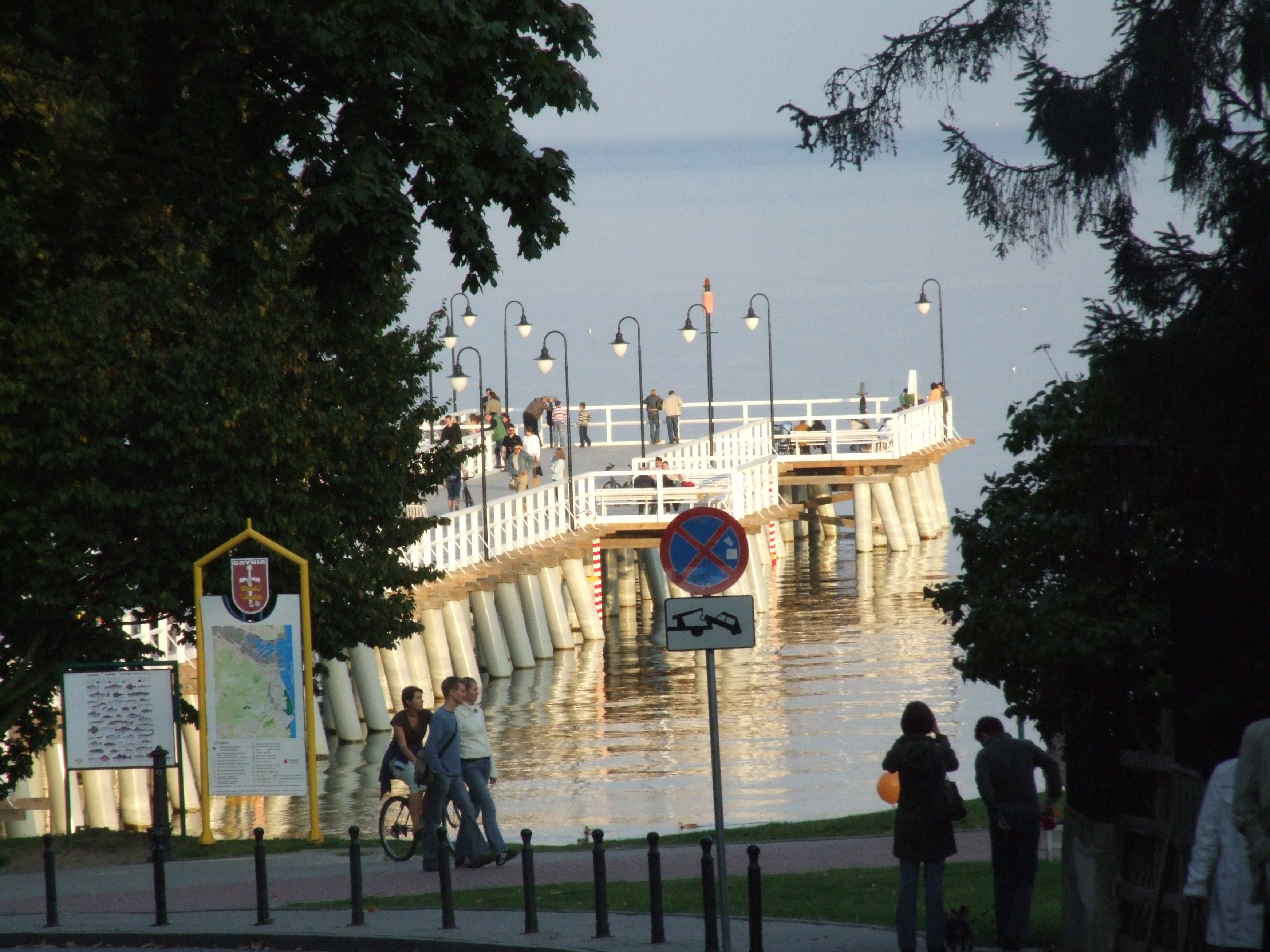 Gdynia-Orłowo - widok na molo